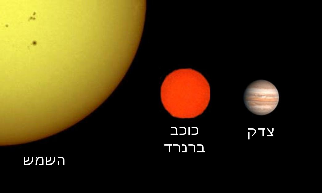 השוואת גדלים (משמאל לימין) : השמש, כוכב ברנרד וצדק.